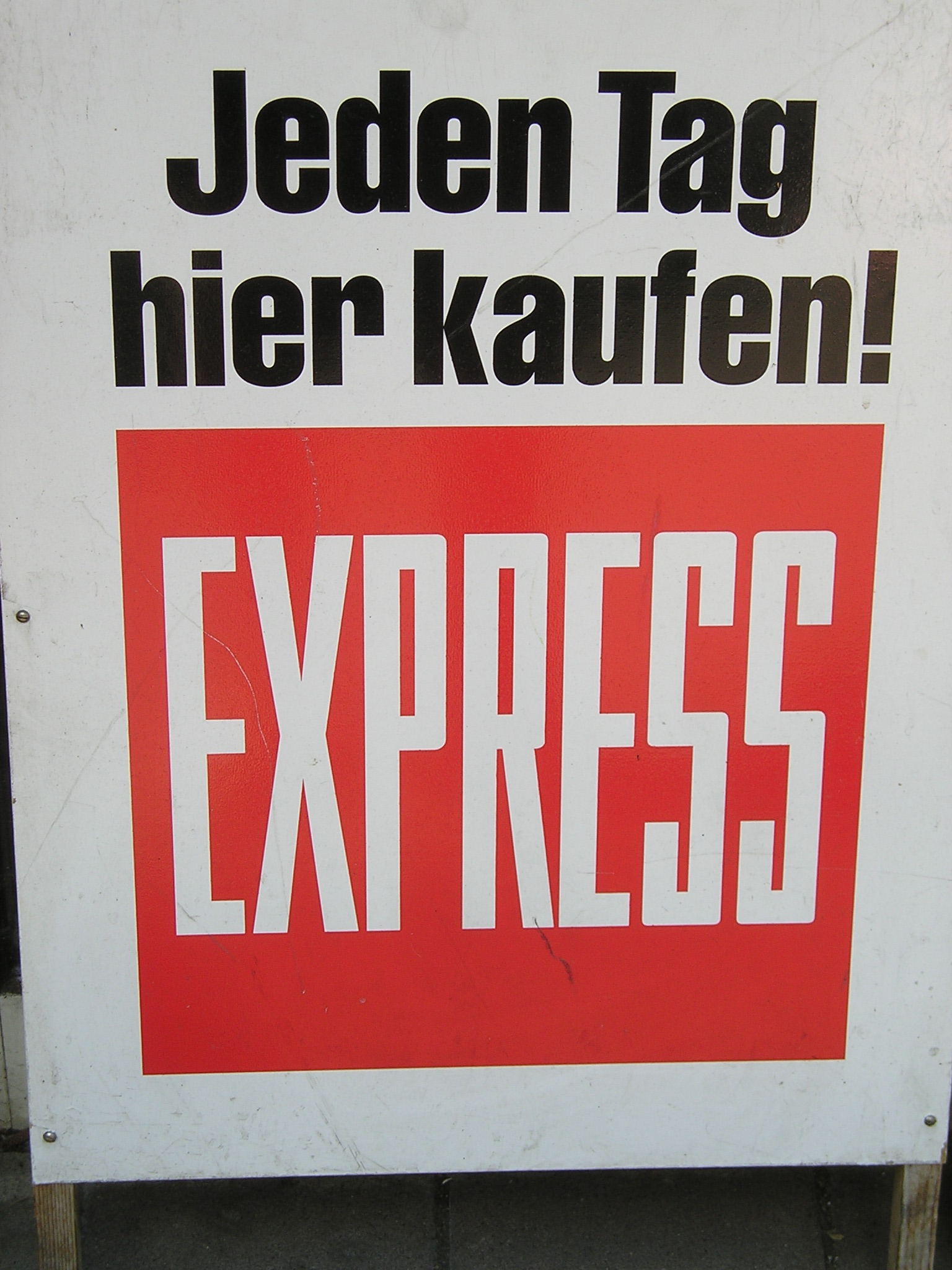 Express Werbeaufsteller, auch Kundenstopper genannt, an einem Kiosk.